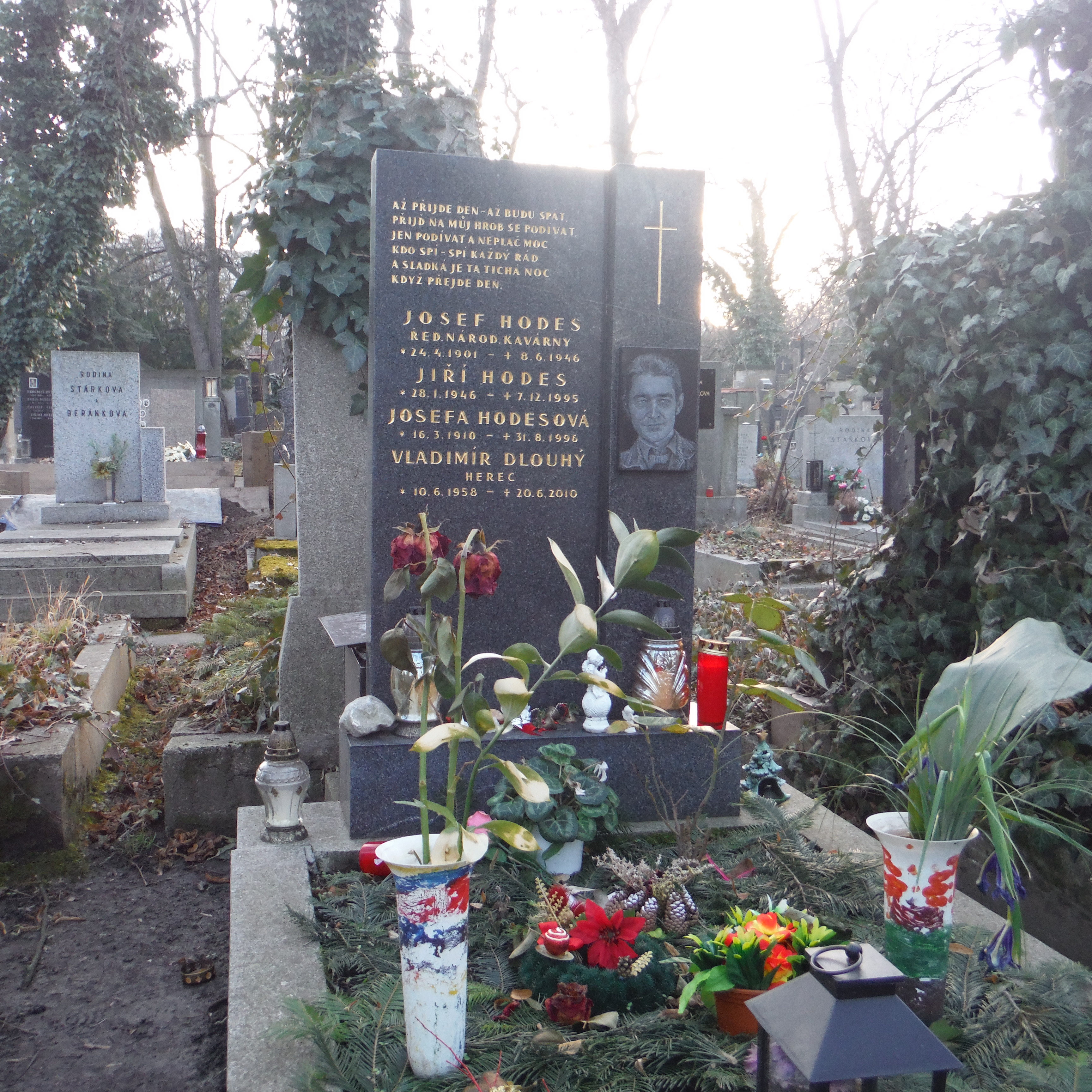 HROB